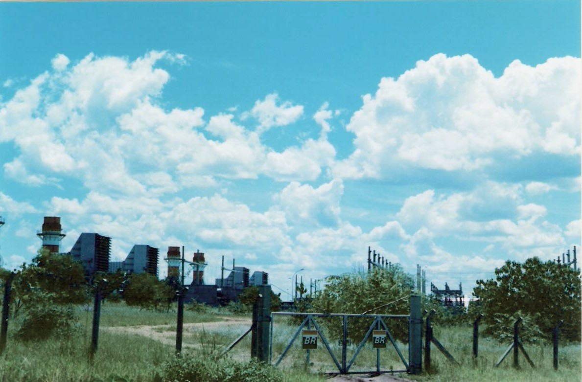 Descrição: A Termelétrica Três Lagoas, na cidade de mesmo nome, em Mato Grosso do Sul, Brasil. 2007.